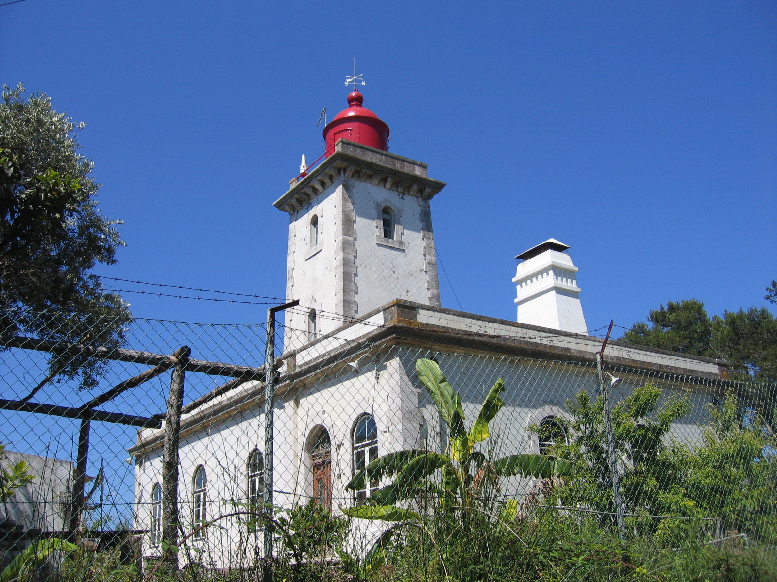 Farol do Esteiro (lado norte), Cruz Quebrada - Dafundo, Oeiras, Lisboa, Portugal